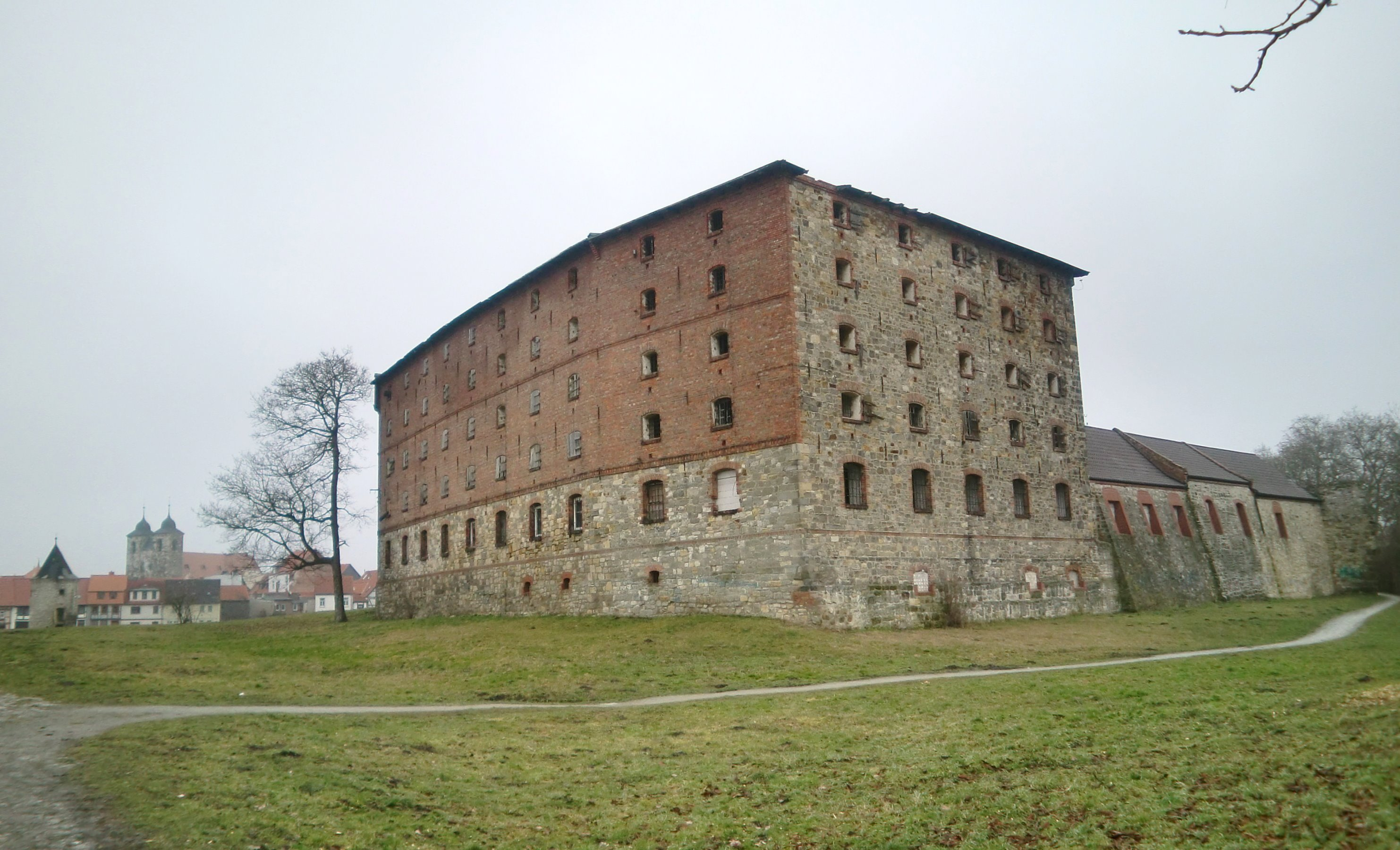 Burg Oschersleben, Speicher